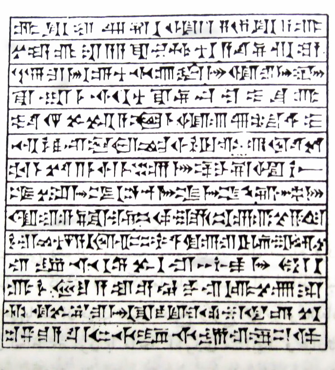 لوح گلی ۱